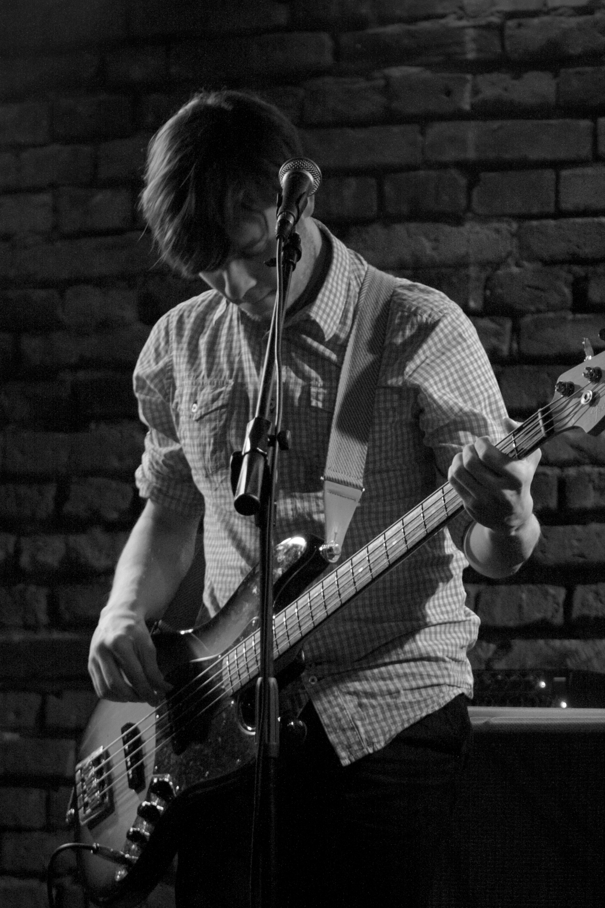 KRAKÓW, POLSKA - 17 LUTEGO: Stefan Nowakowski (bass) z grupy Jazzpospolita podczas koncertu, który odbył się na scenie Alchemii 17 lutego 2011 w Krakowie, Polska. (foto: Wojciech Migda)